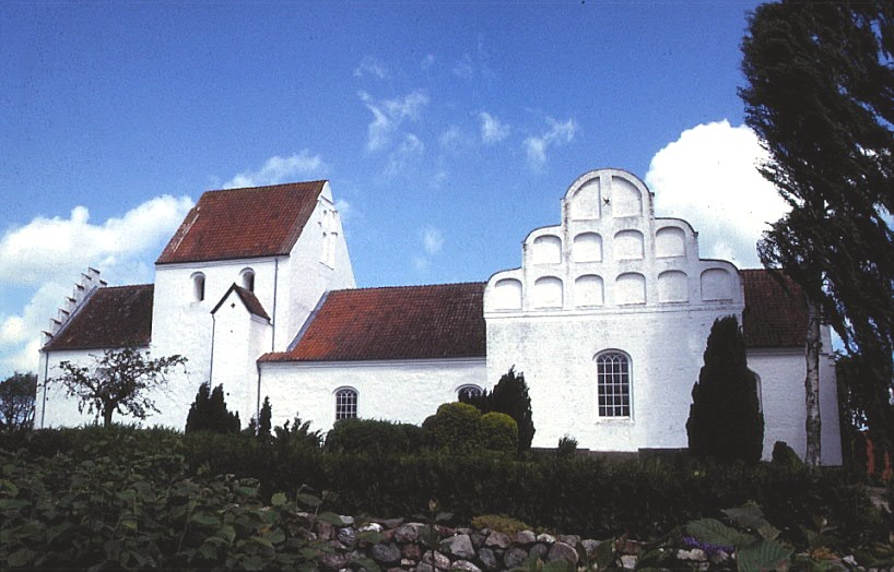 Hesselager Kirke i Danmark. Hesselager kirke